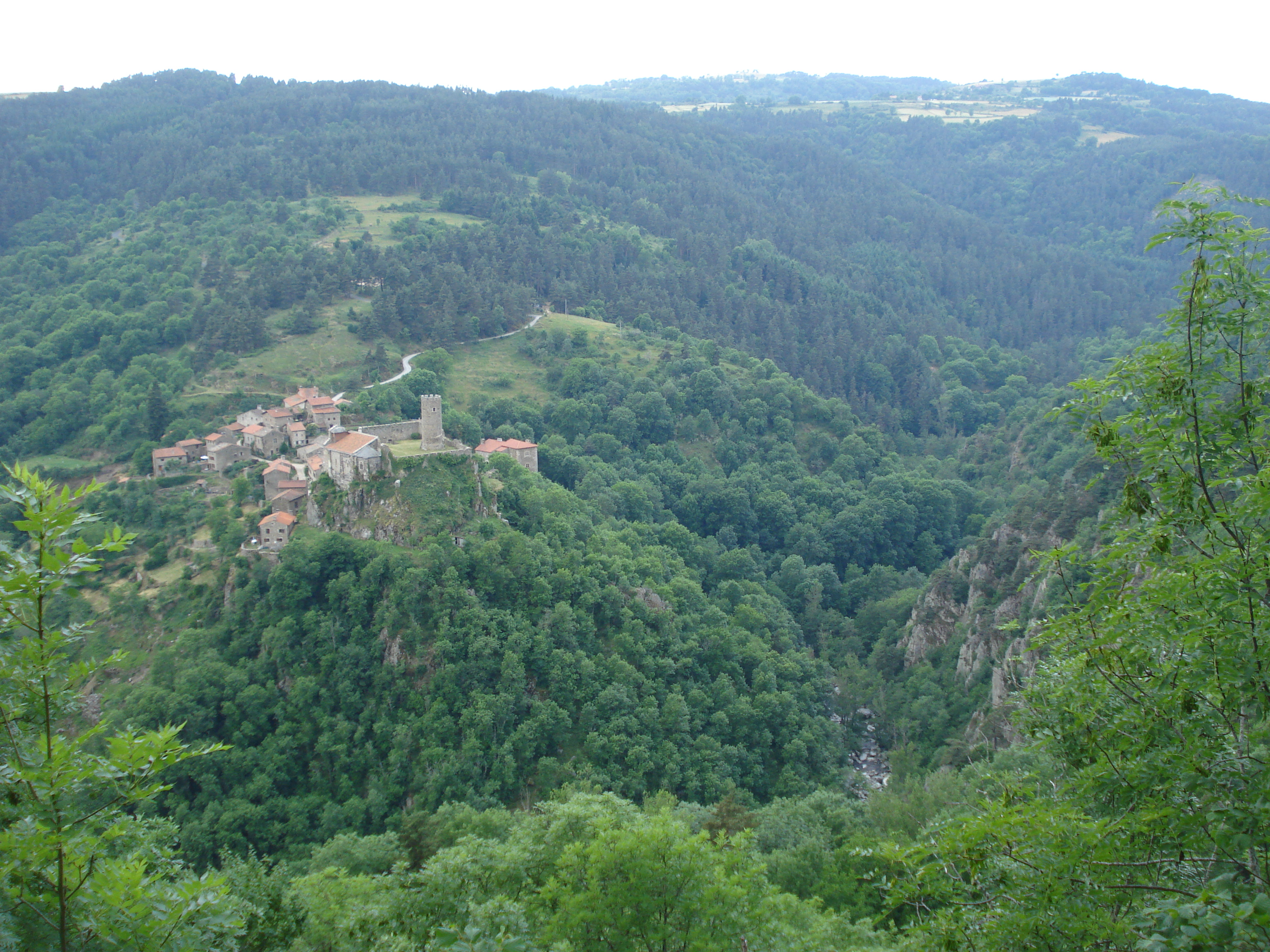 Tiranges (Haute-Loire, Fr), la vue sur les gorges de l'Ance et le château de Chalancon